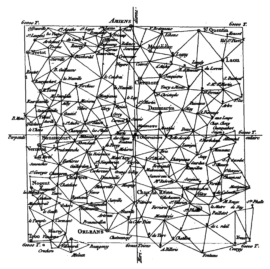 Carte triangulée de 60 000 toises autour de Paris.